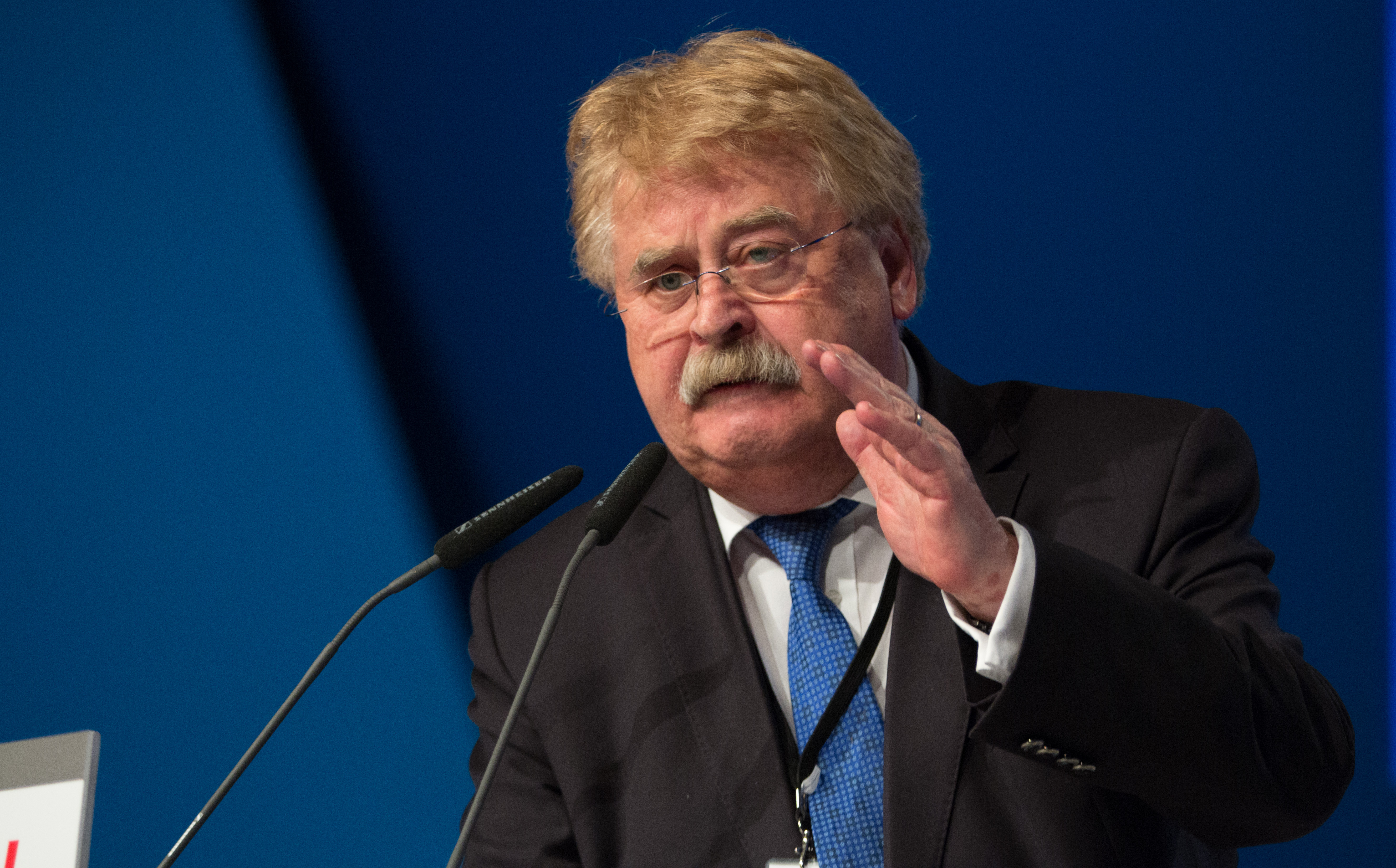 Elmar Brok, Europaabgeordneter und Mitglied des CDU Bundesvorstandes auf dem 29. Parteitag der CDU Deutschlands am 6. Dezember 2016 in Essen, Grugahalle